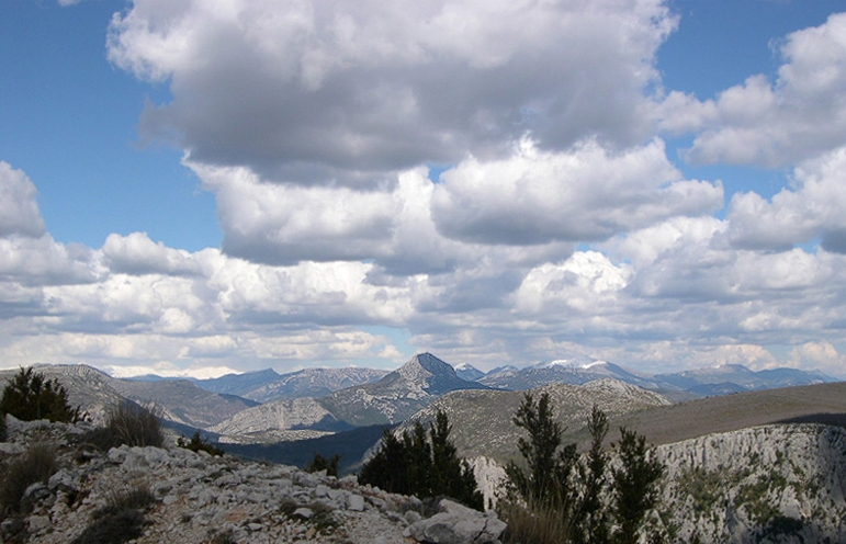 Les Ocres - France